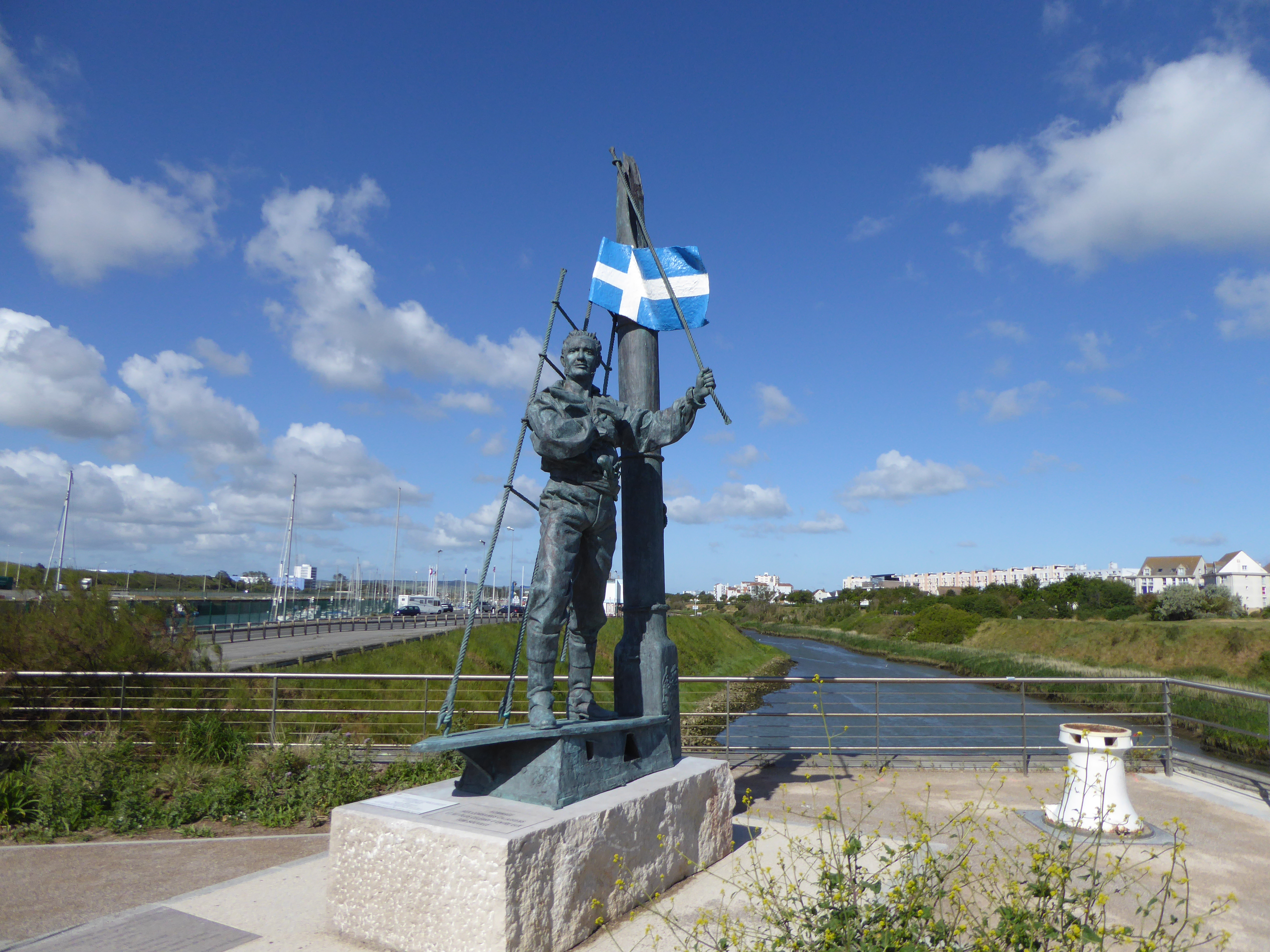 Statue de Tom Souville Calais à côté du pont tournant